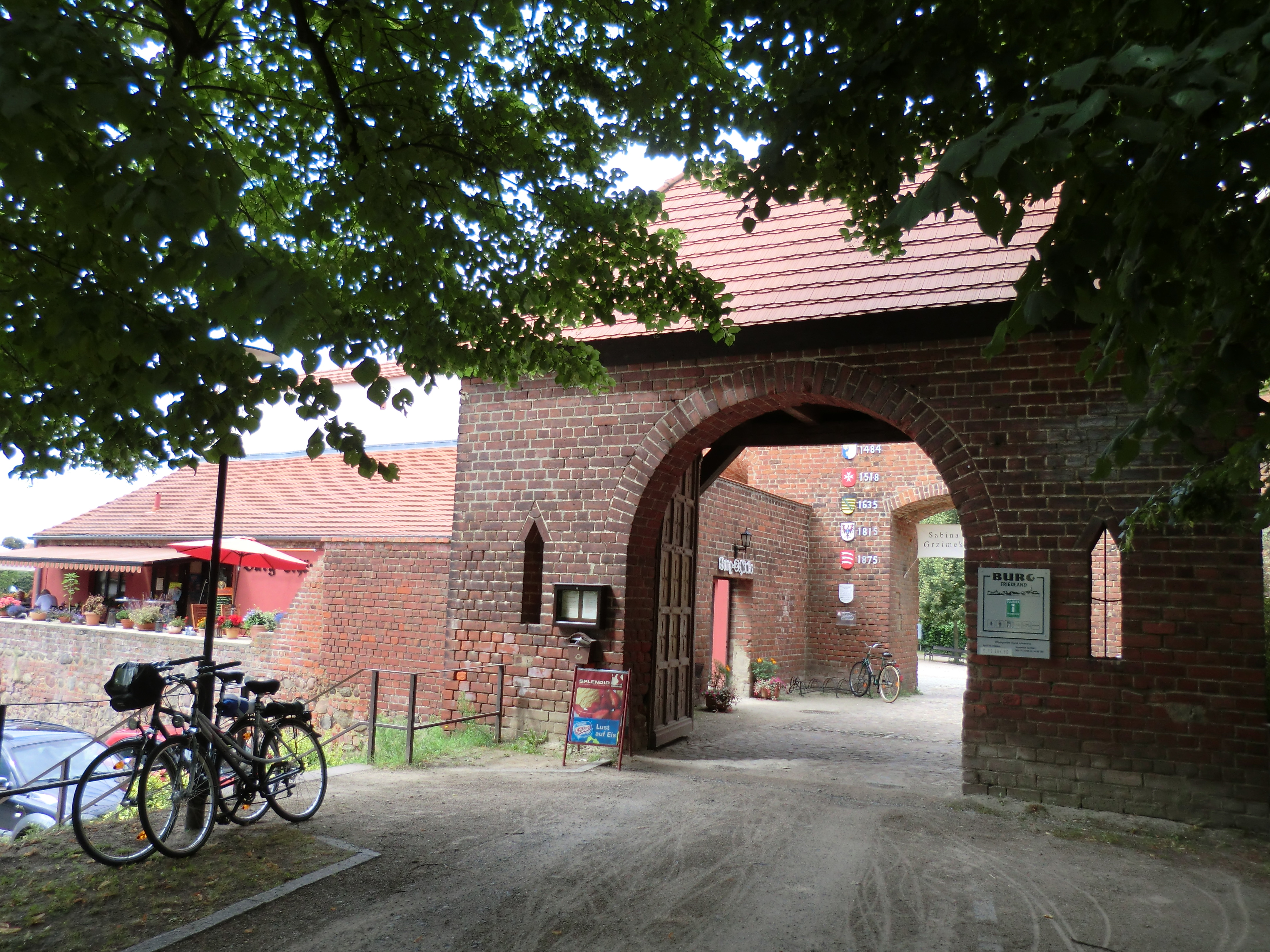 Burg Friedland, Niederlauzitz, Brandenburg.